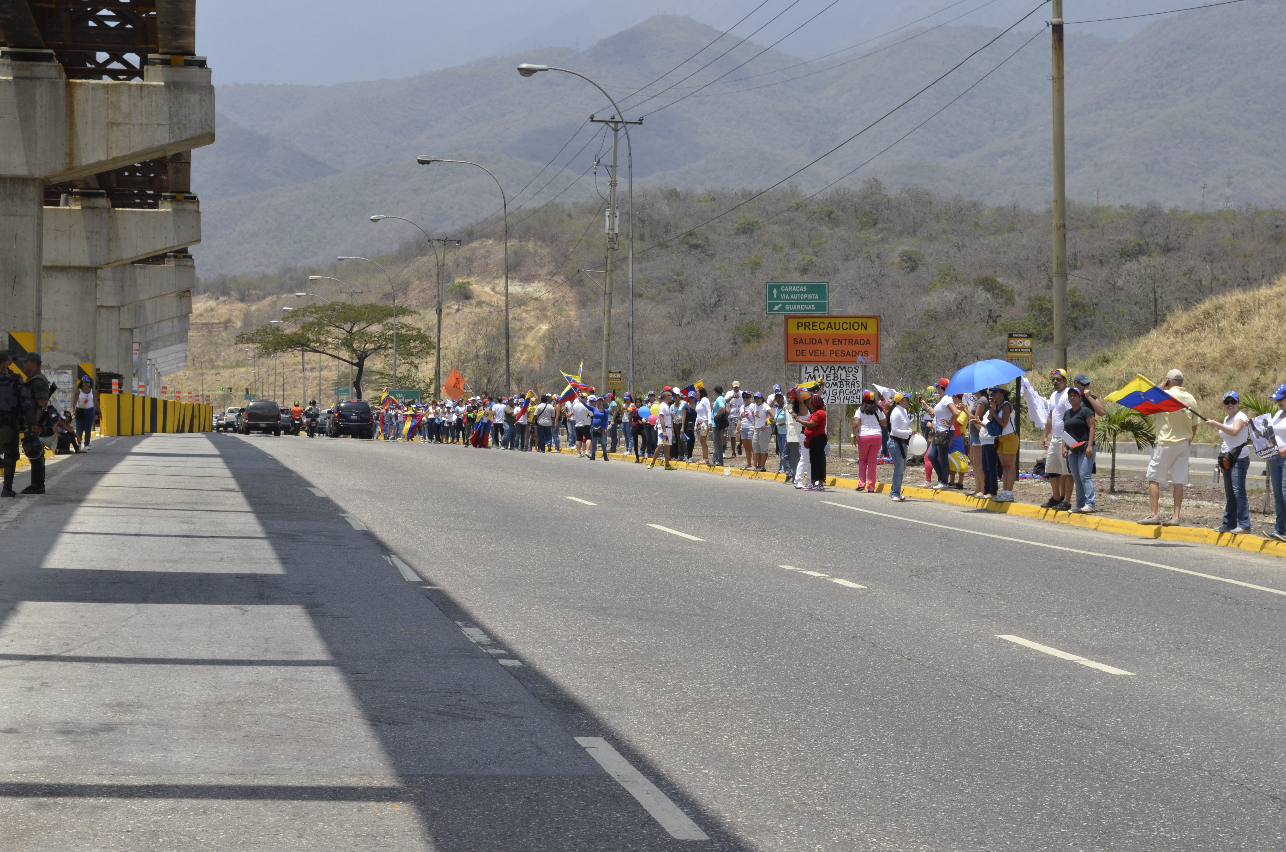 Cadena Humana Guarenas Guatire, 23Mar14